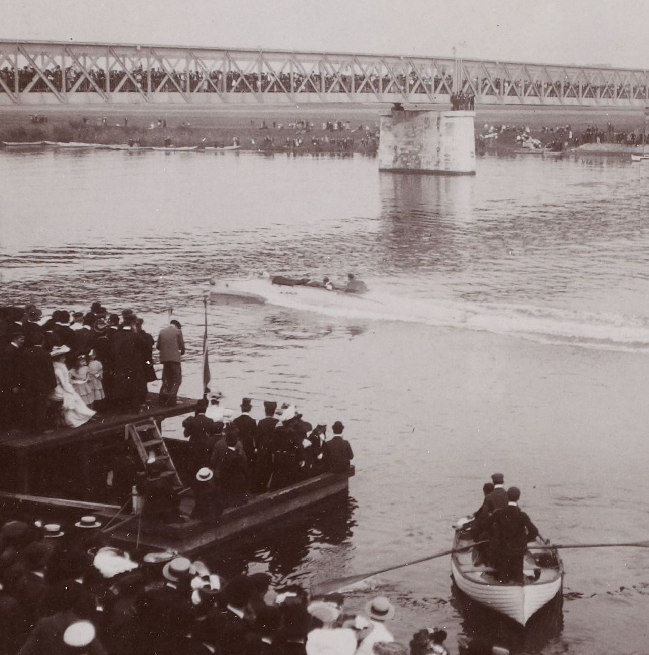 [Collection Jules Beau. Photographie sportive] : T. 28. AnnÃ©e 1904 / Jules Beau : F. 5v. [Canots automobiles, Juvisy, 25 septembre 1904]